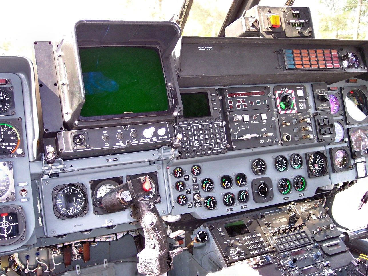 Cockpit einer Westland Lynx der Bundesmarine